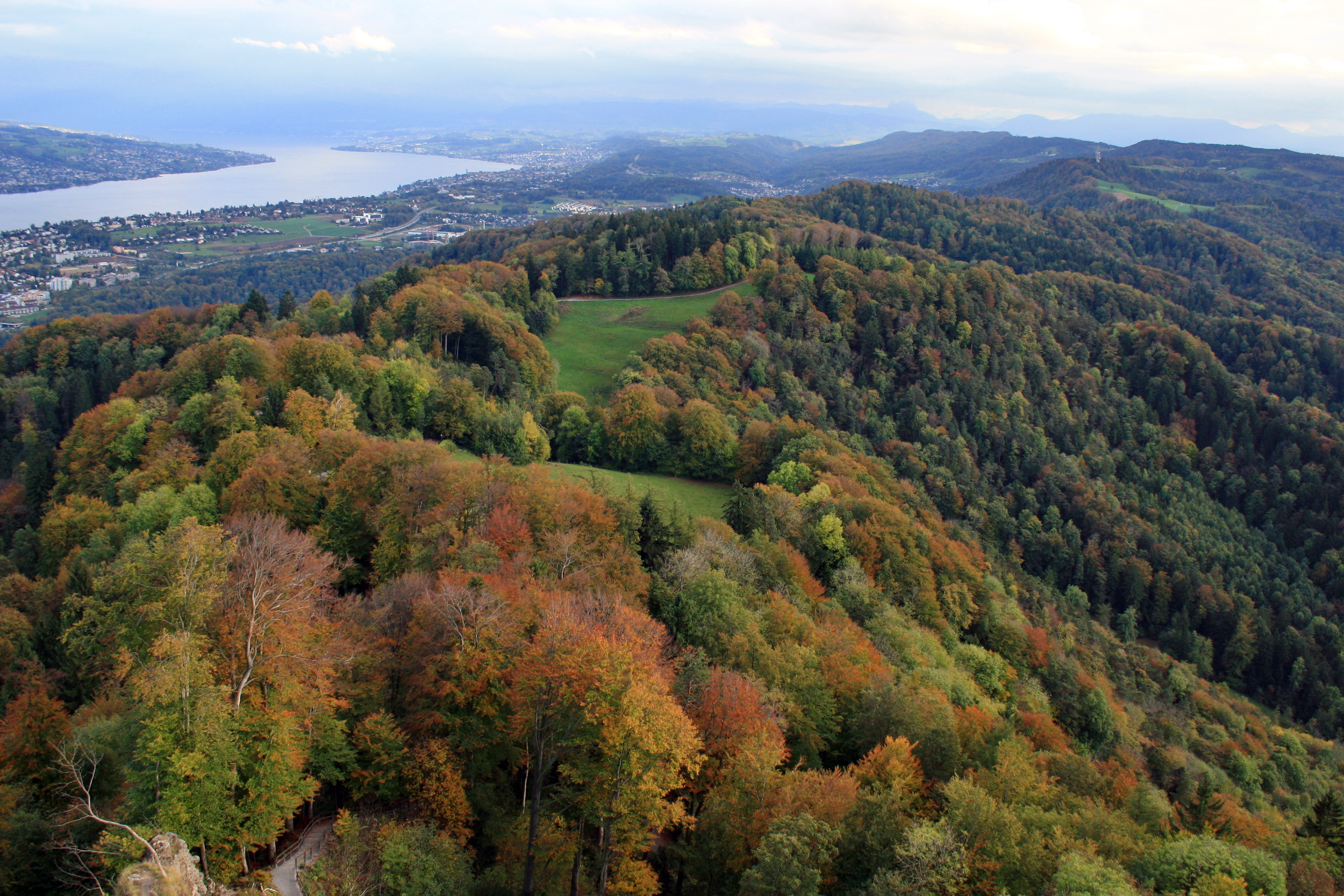 Albis, Sihltal (Sihl Valley), Zimmerberg, Zürichsee (Lake Zürich) and Pfannenstiel (to the left), as seen from Aussichtsturm.